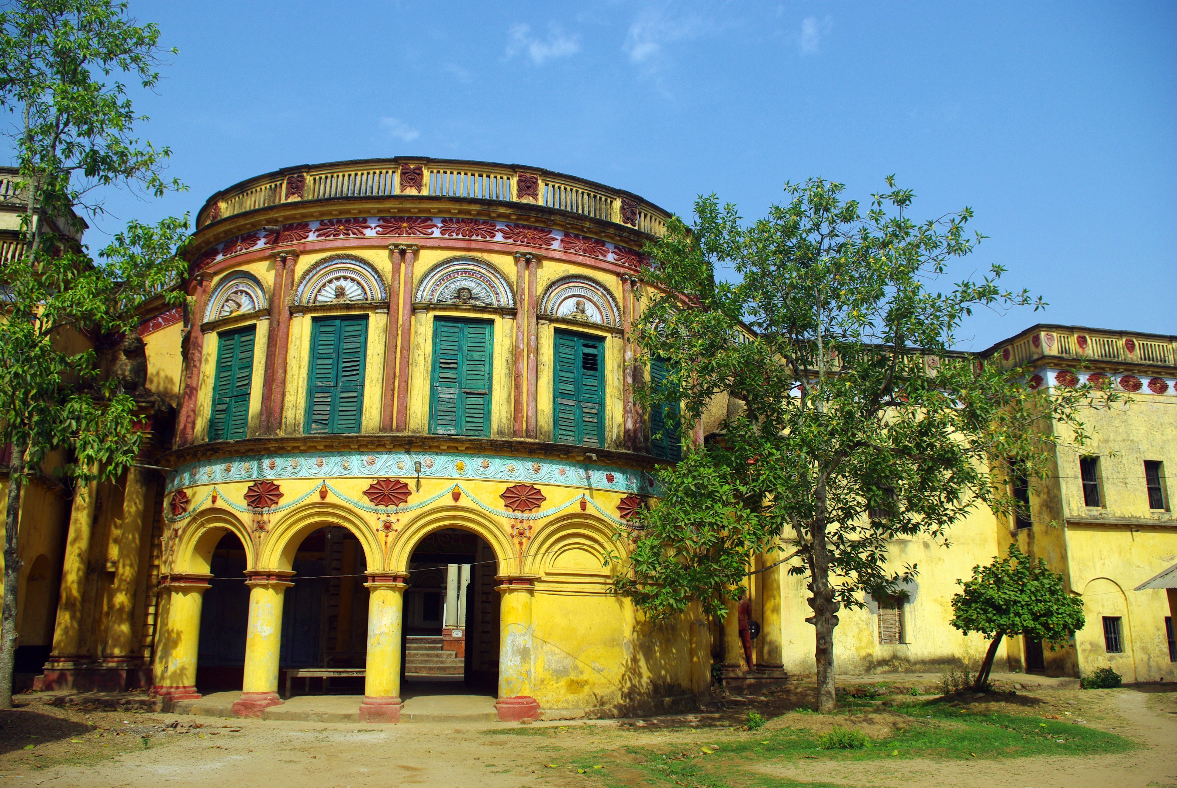 বাঁকুড়া জেলার হদল নারায়ণপুরের মন্ডল পরিবারের বড় তরফের সুরম্য প্রাসাদের ন্যায় বাসস্থান